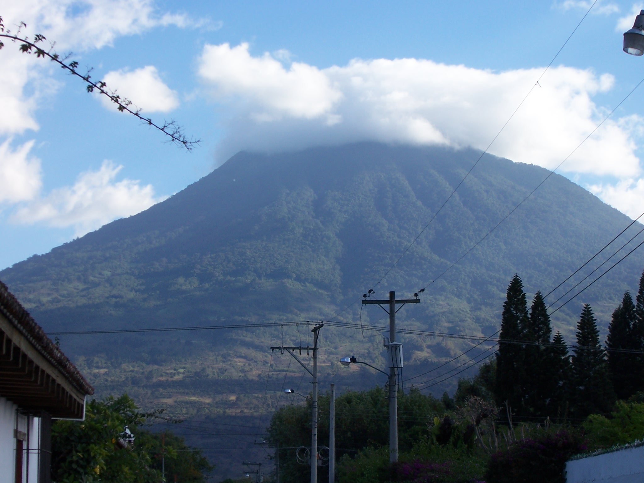 Paisaje del Volcan de Agua, Guatemala